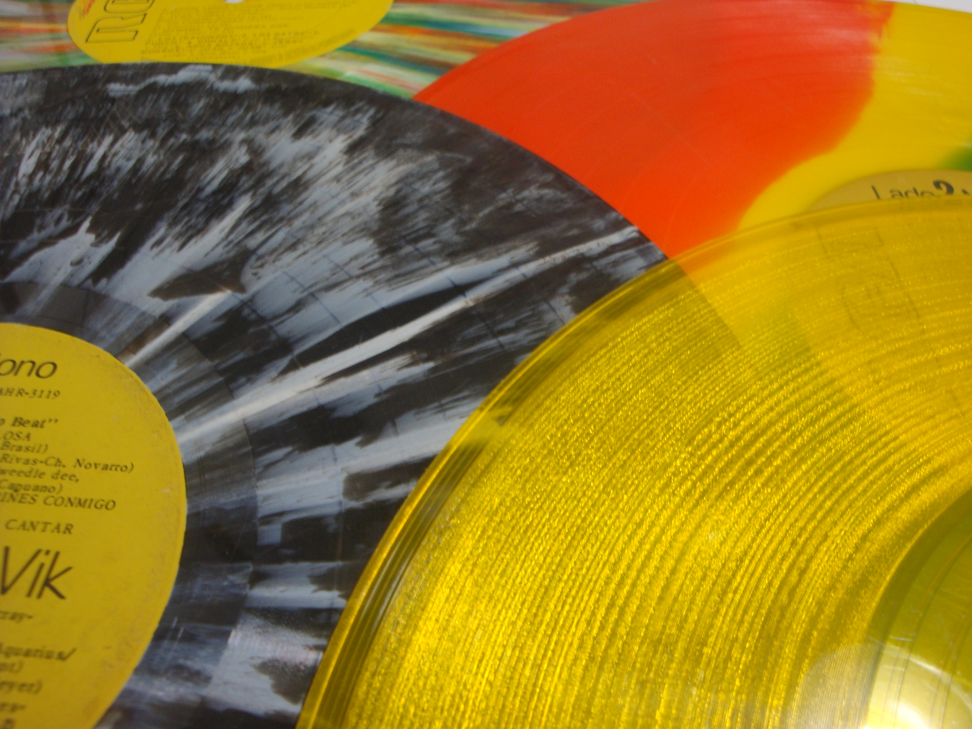 Discos de vinilo de colores.